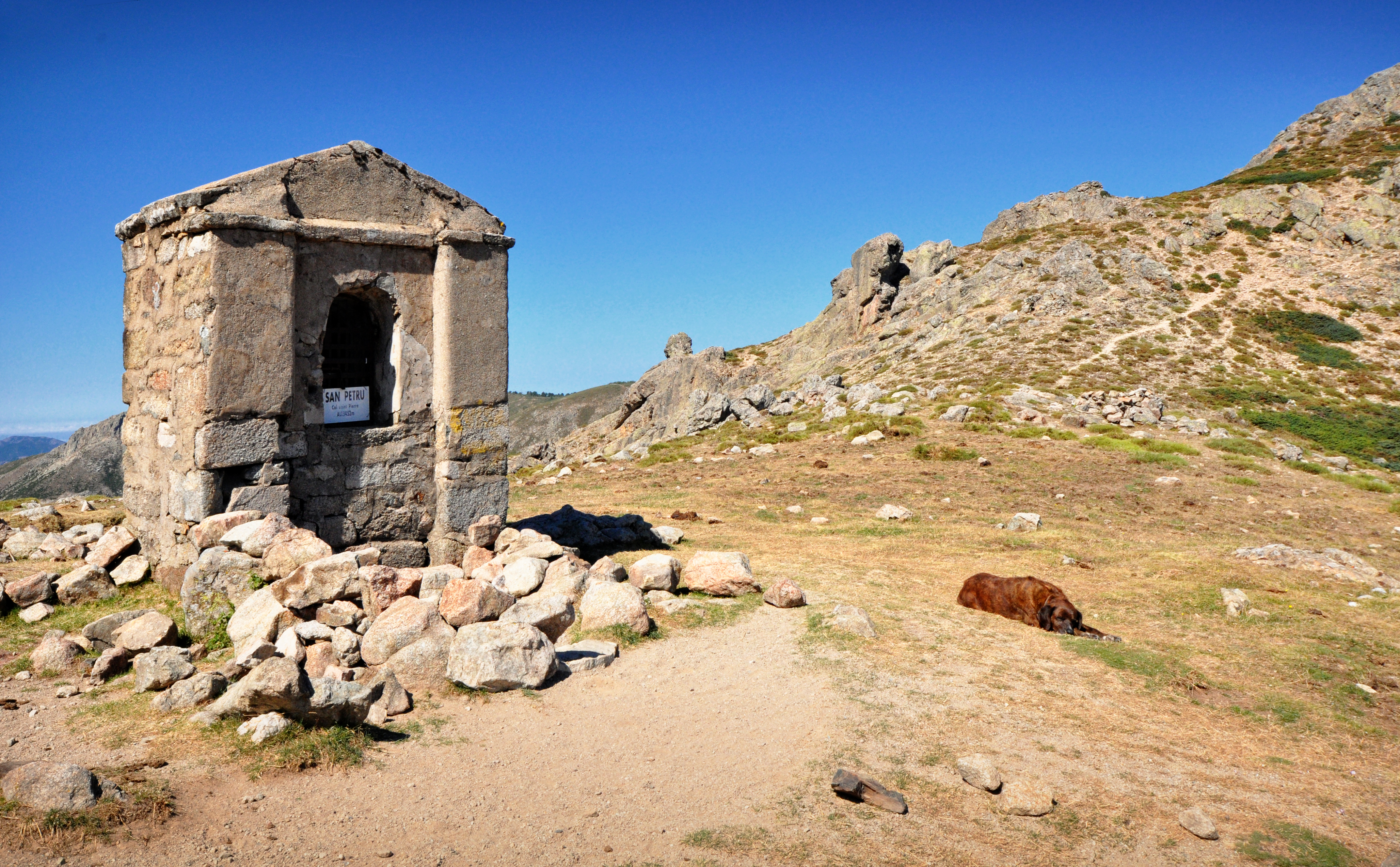 Albertacce (Corsica) - Oratoire San-Petru au col Saint-Pierre (1452 m)